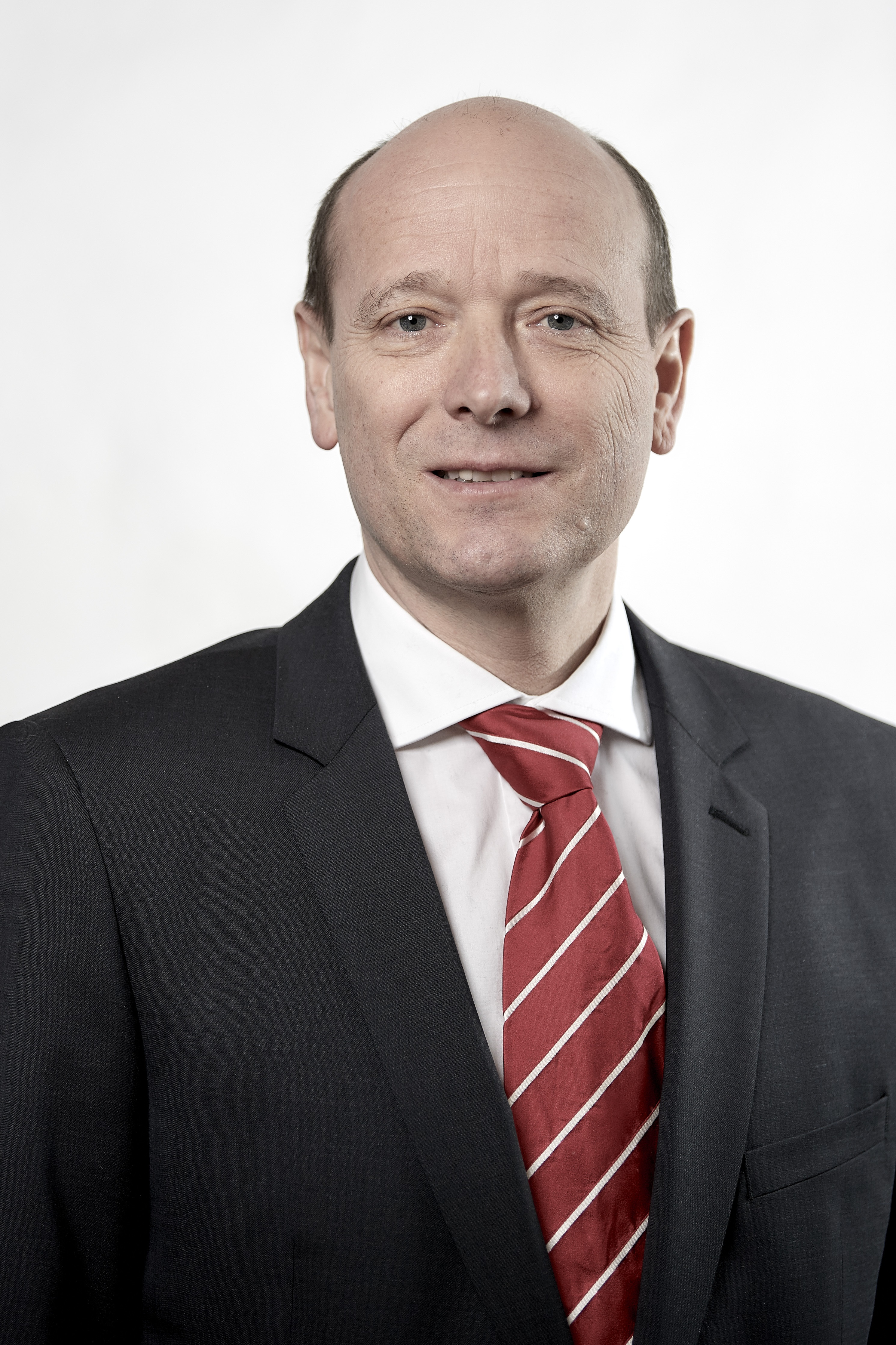 Offizielles Portrait von Michael Aebersold als Berner Gemeinderat, 2017